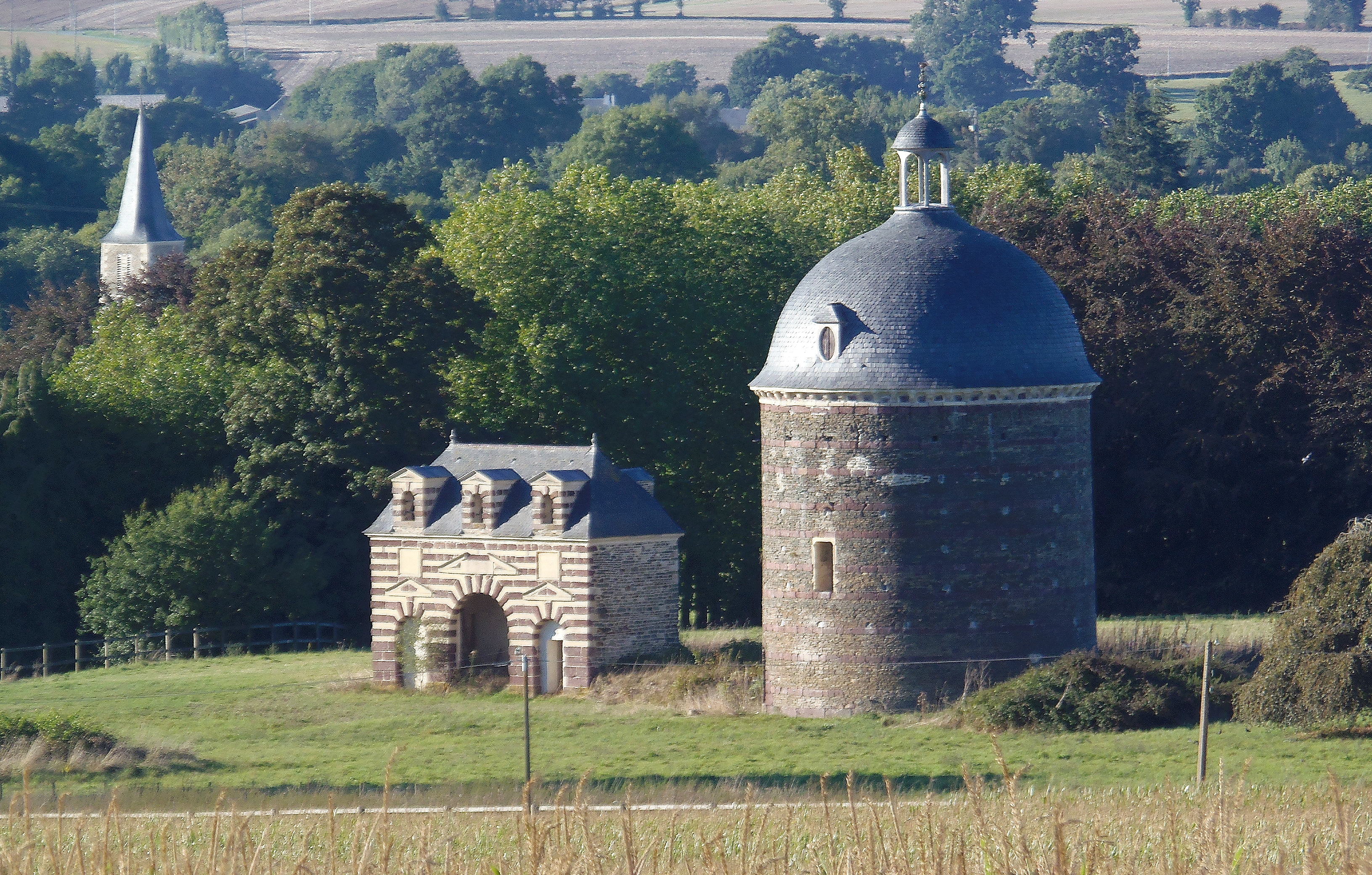 Dampierre (Normandie, France). La porterie et le colombier du chäteau .